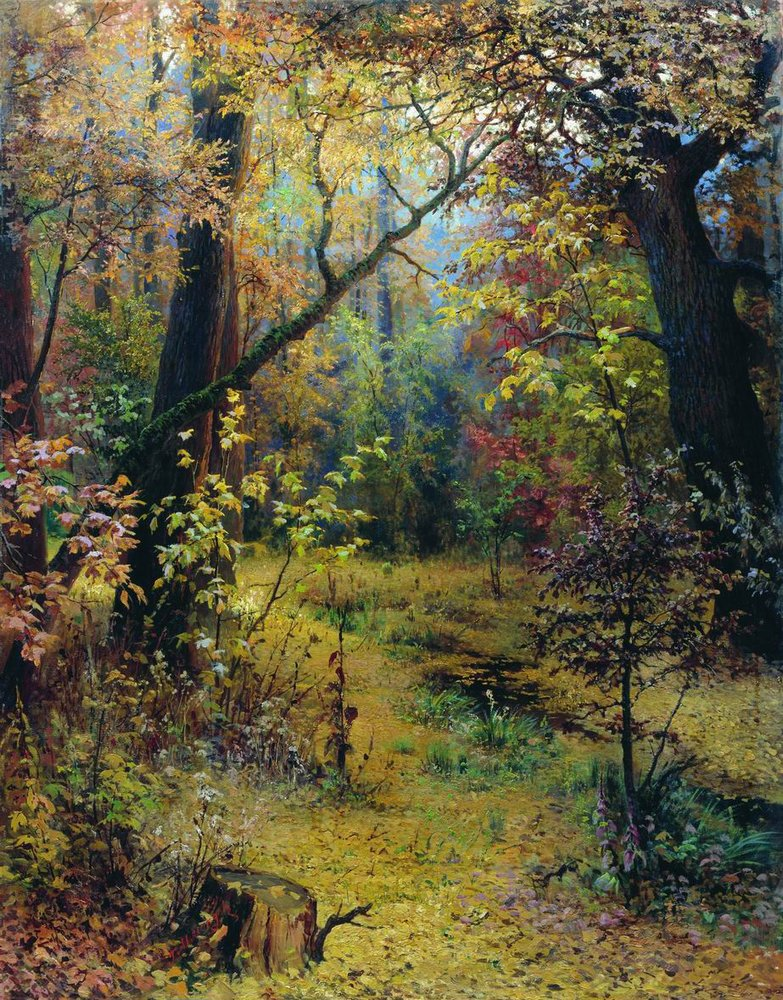 Autumn Morning